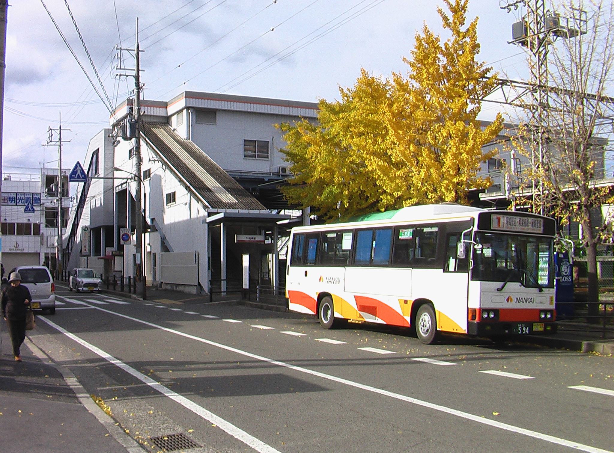 投稿者自身が南海本線「尾崎」駅の外観を現地で撮影。 2006年12月04日（月）撮影 機材：某メーカー製デジタルスチルカメラ 撮影者：阪神強いな